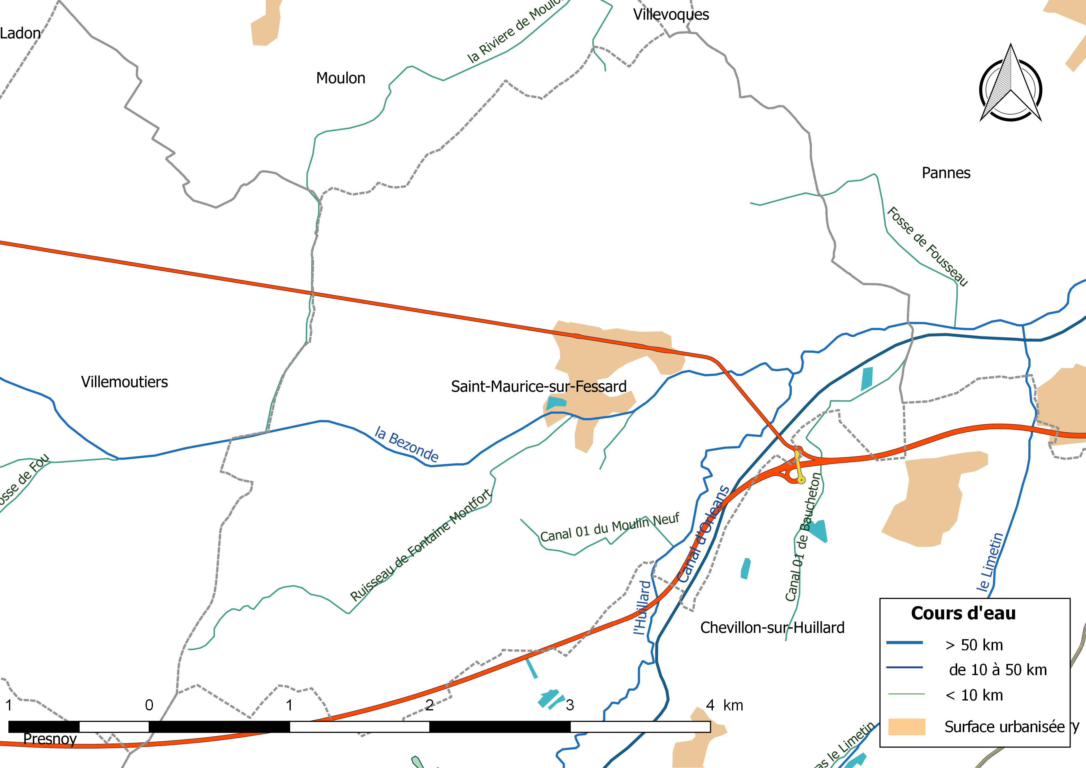 Carte du réseau hydrographique de la commune de Saint-Maurice-sur-Fessard (France).